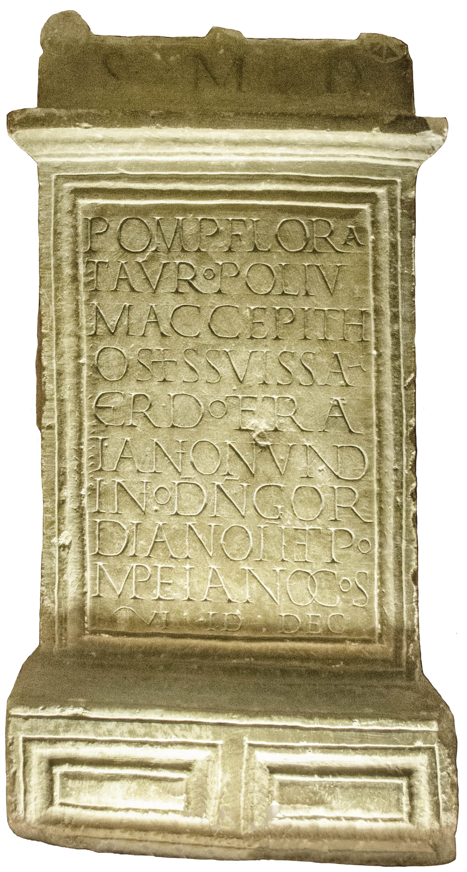 Autel taurobolique de Pompeia Flora, 241 ap. JC, marbre, CIL XIII, 516. Musée Eugène-Camoreyt de Lectoure, Gers, France.